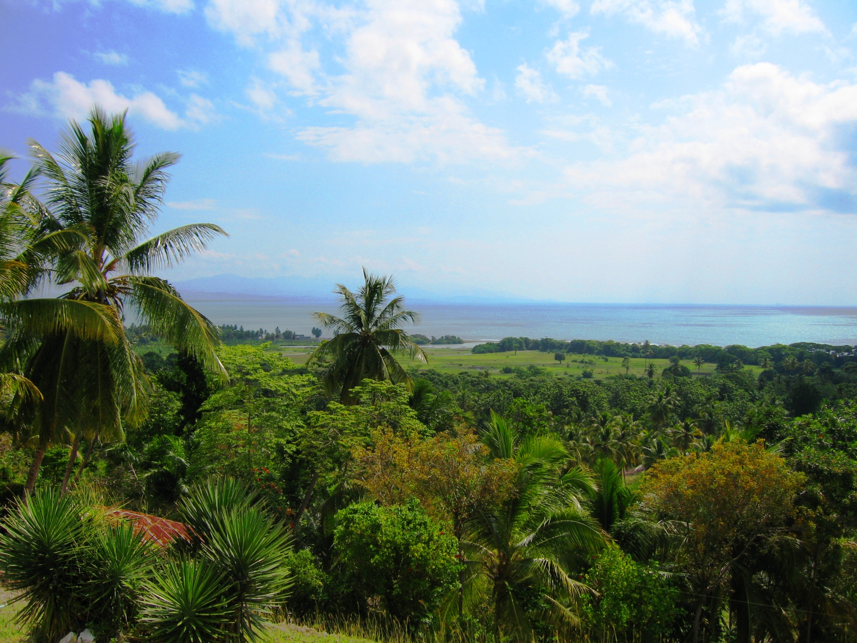 Les Cayes, Departement du Sud, Haiti, Hispaniola